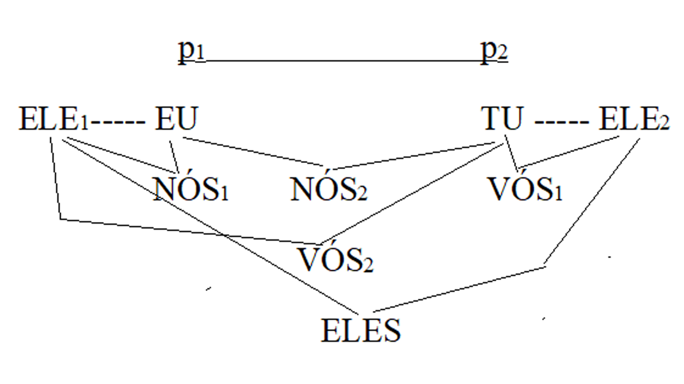 Vejamos um cenário com duas pessoas (p1, p2). A primeira é representada por EU; a segunda, por TU (ou VOCÊ). Mas, como ninguém está sozinho no mundo, EU tem por trás de si tudo que lhe diz respeito, inclusive seu grupo, seus parentes. Tudo isso pode ser representado por ELE1, aquele/aquilo que está com EU. O equivalente para TU é ELE2, aquele/aquilo que está com TU. Daí emergem os demais "pronomes", "pessoas do discurso". EU está para quem fala, TU para com quem se fala, ELE de quem se fala. A combinação dessas entidades para produzir as demais está representada no esquema a seguir.